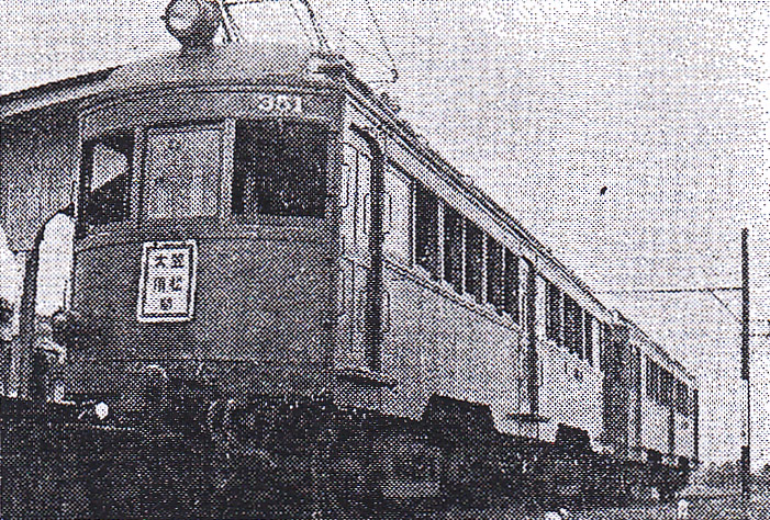 名鉄モ350形電車。旧・名古屋電気鉄道1500形として1921年新製。名鉄竹鼻線大須駅にて撮影。